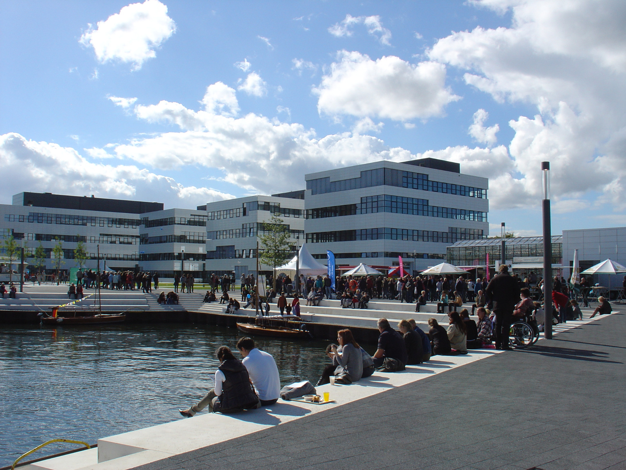 Kampus der Hochschule Rhein-Waal in Kleve am Tag der offenen Tür am 22.09.2012